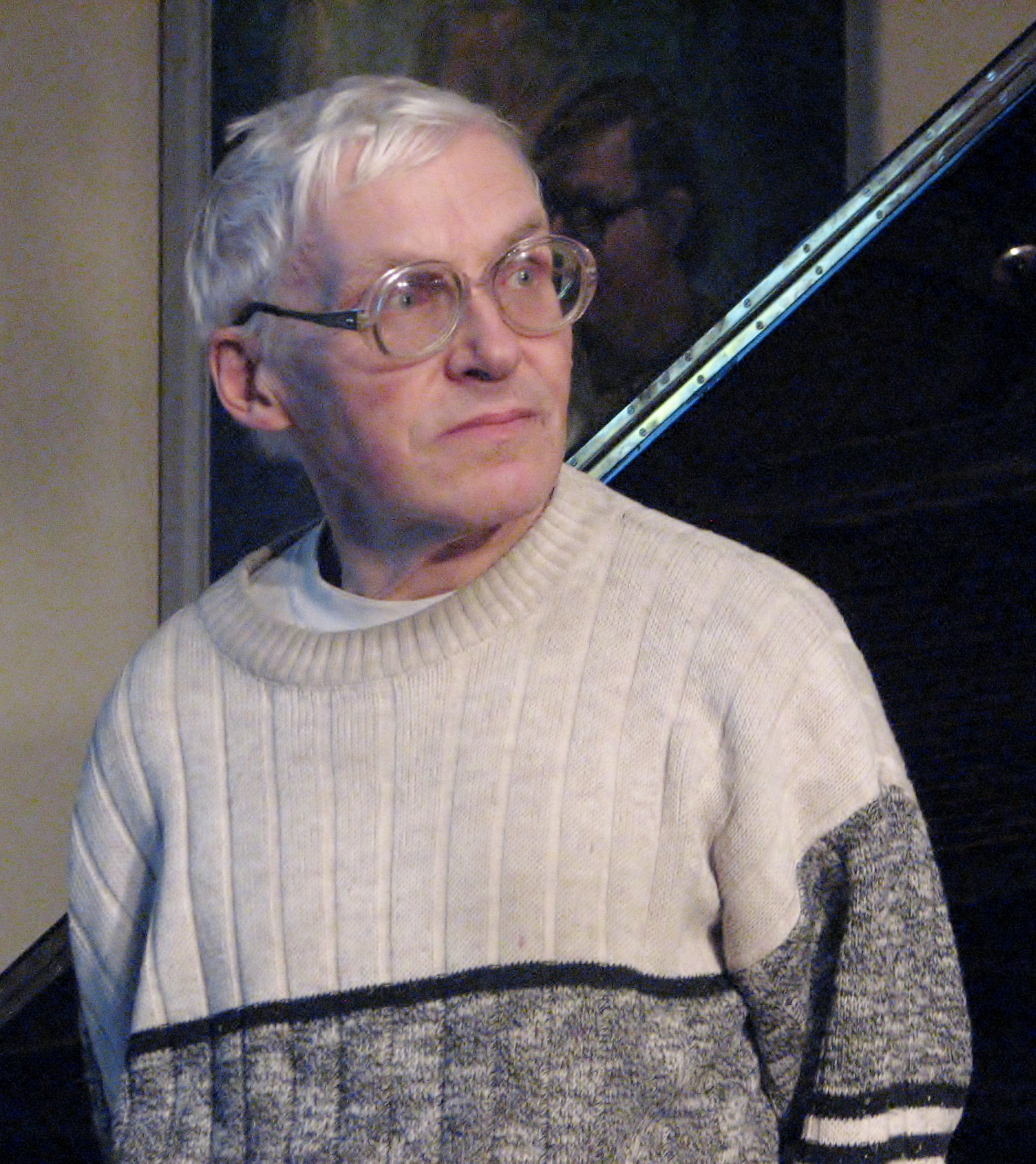 Mart Humal Eesti Teatri- ja Muusikamuuseumi sinise laega saalis sarja ”Heino Elleri kogutud klaveriteosed” IV ja V heliplaadi esitlusel.